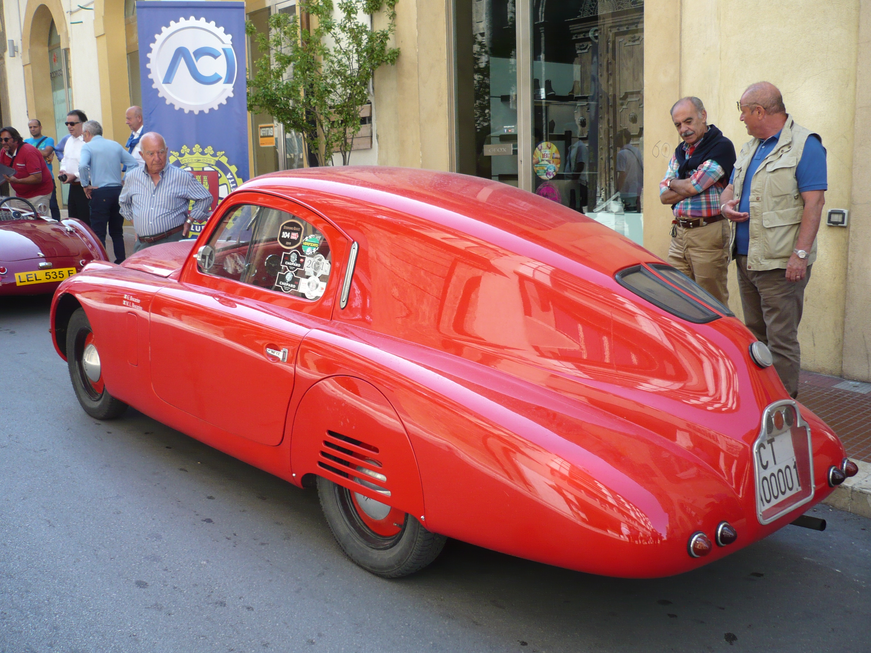 Laterale della Fiat 508 CS MM o berlinetta Mille Miglia prodotta nel 1938 su meccanica della Spider Sport del 1934, mentre la carrozzeria è quella di una berlinetta biposto aerodinamica, pensata per le corse in climi rigidi come appunto la Mille Miglia. Motore Fiat 108C da 4 cilindri in linea di 995 cm³ a valvole laterali, con carburatore Solex mono corpo. Sospensioni: ant. e post. ad assale rigido, con balestre semiellittiche.